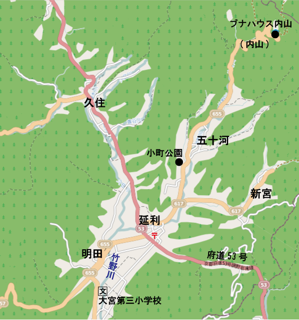 京都府京丹後市五十河の地図 This map may be incomplete, and may contain errors. Don't rely solely on it for navigation.